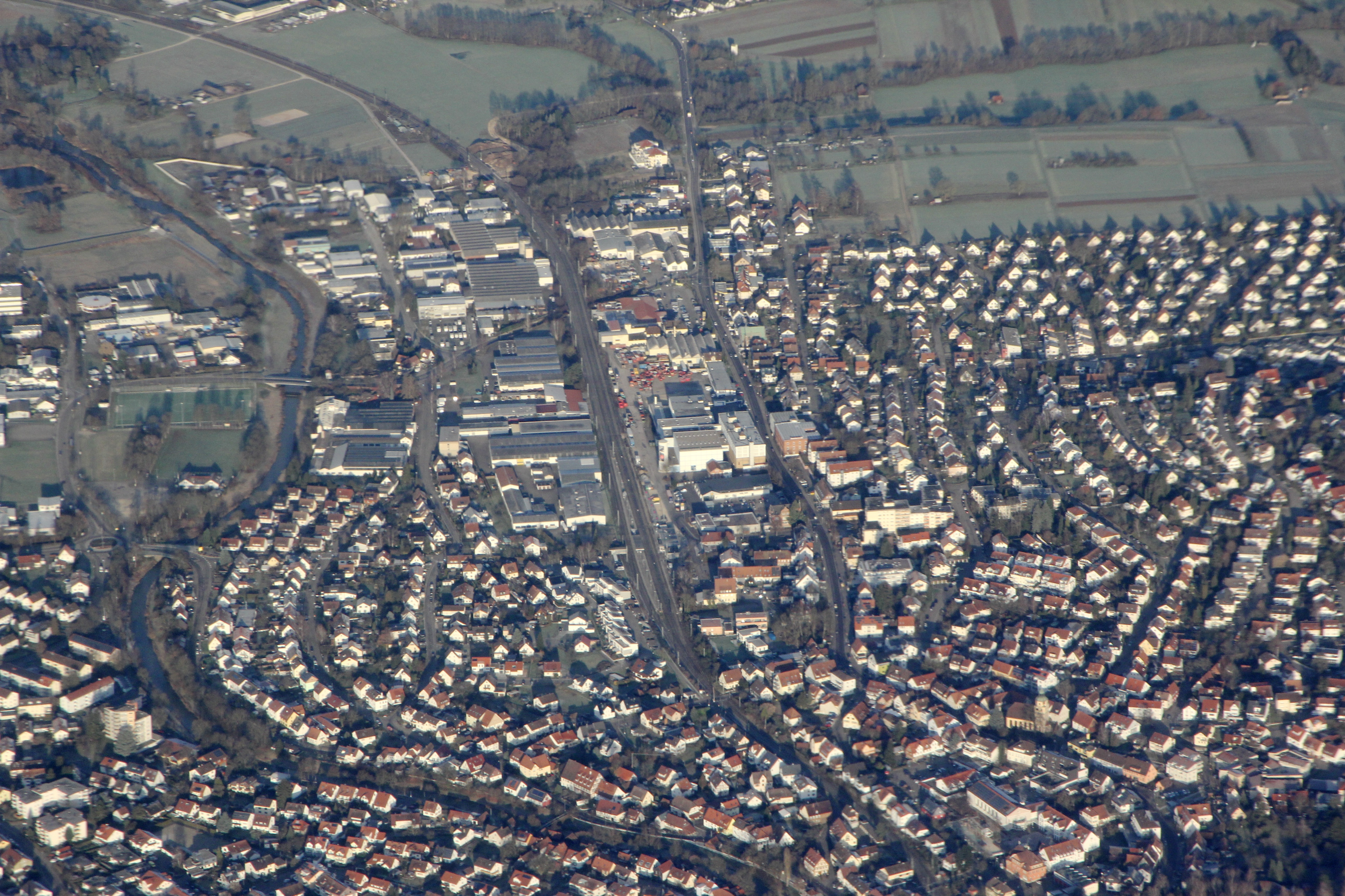 Luftbild von Plüderhausen im Rems-Murr-Kreis, Baden-Württemberg, Deutschland. Rems und Bahnhof sind gut erkennbar.